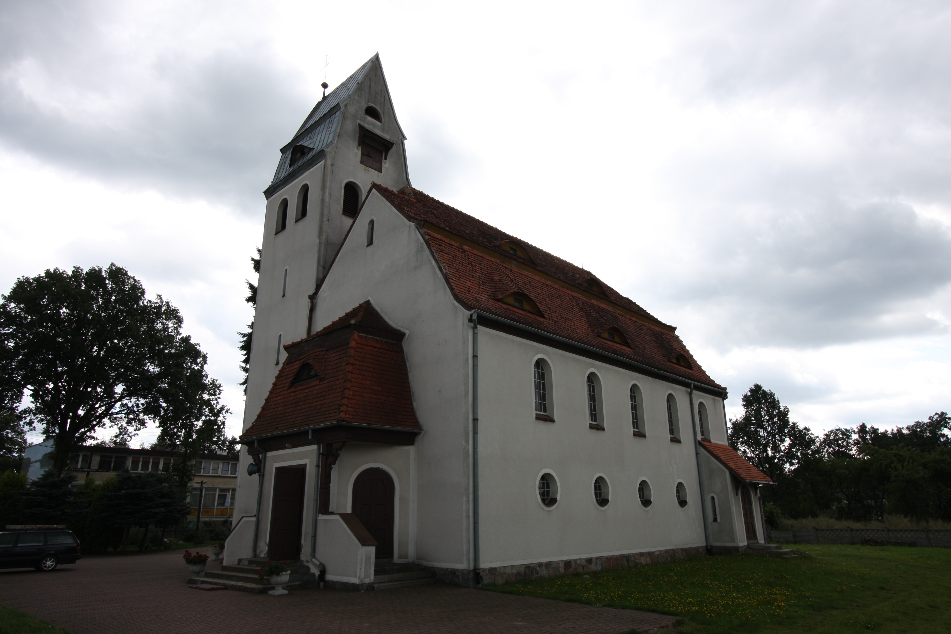 Miedzichowo, kościół ewangelicki, ob. rzym.-kat. par. p.w. św. Stanisława, mur., 1907 (zabytek nr rejestr. 385)